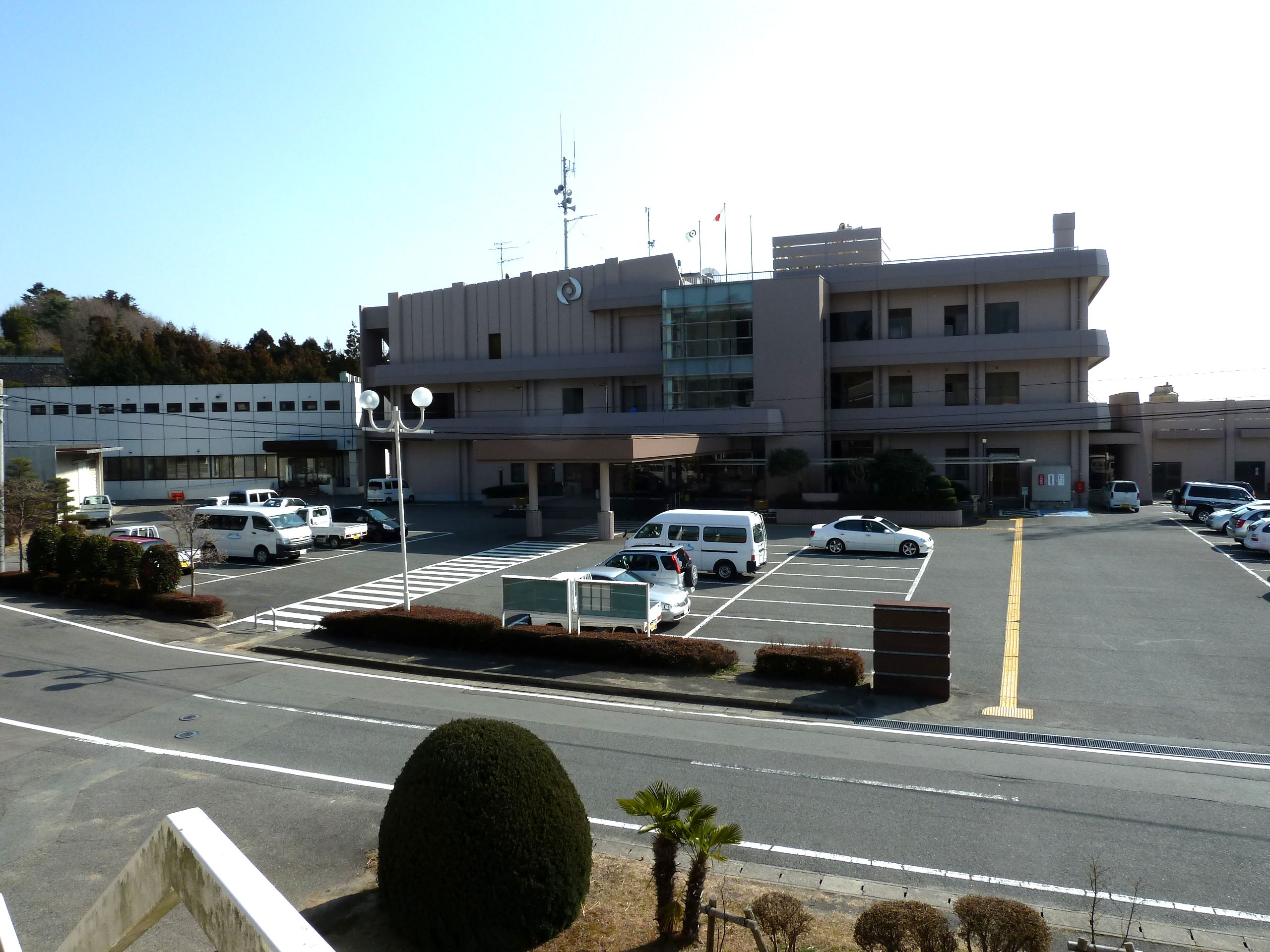 楢葉町役場